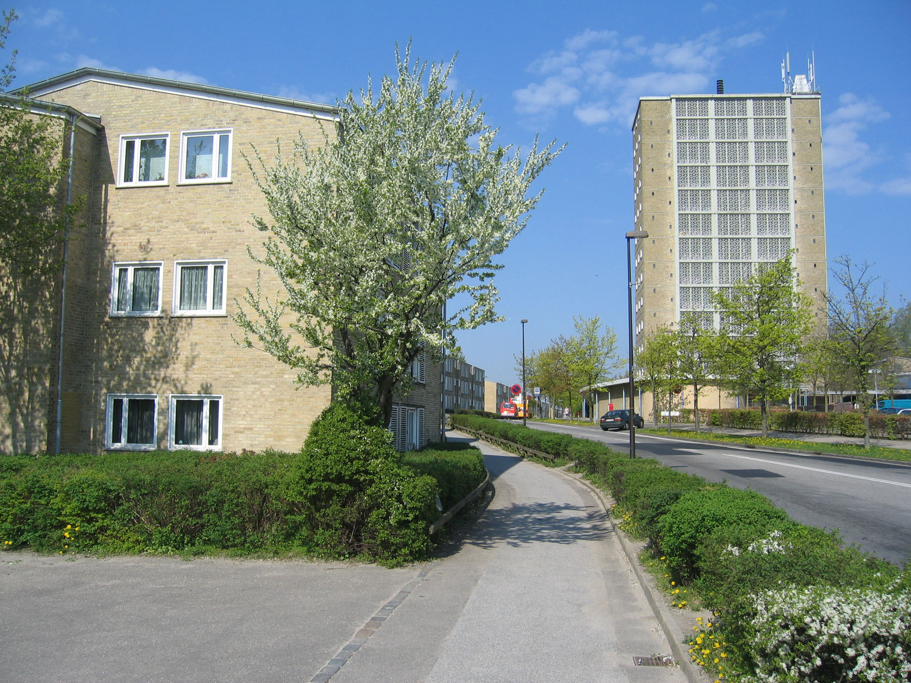 Tingbjergs karakteristiske gule murstensbygninger